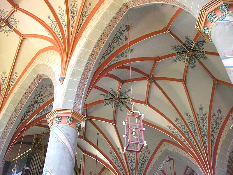 Pfarrkirche St. Anna (Waal bei Landsberg am Lech, Landkreis Ostallgäu, Bayerisch-Schwaben). Blick ins Gewölbe des Langhauses. Eigene Aufnahme, Juli 2007 / Parish church St. Anne (Waal near Landsberg am Lech, Bavaria, Germany). The nave, looking up into the vault. Own photo, July 2007